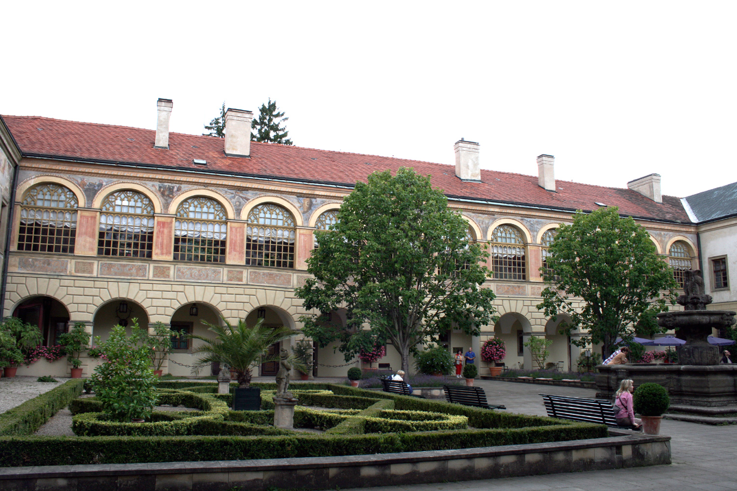 Častolovice castle, east Bohemia, Czech republic zámek Častolovice, východní Čechy photo July 2007 Author= Karelj